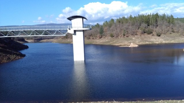 Lac vue du barrage